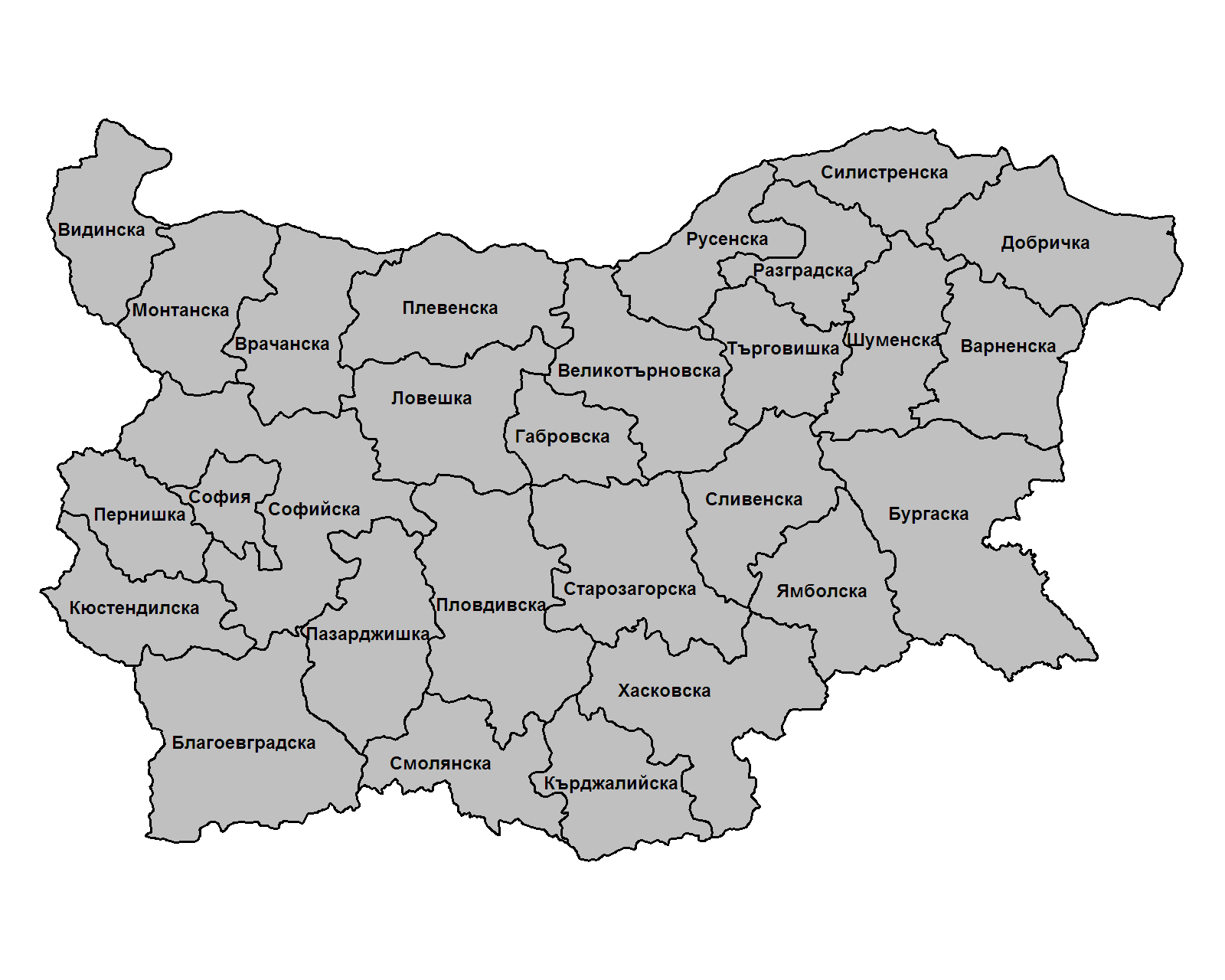 Областите в България